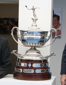 Copa de ganador del Trofeo de tenis Conde de Godó 2008, en Barcelona (España)